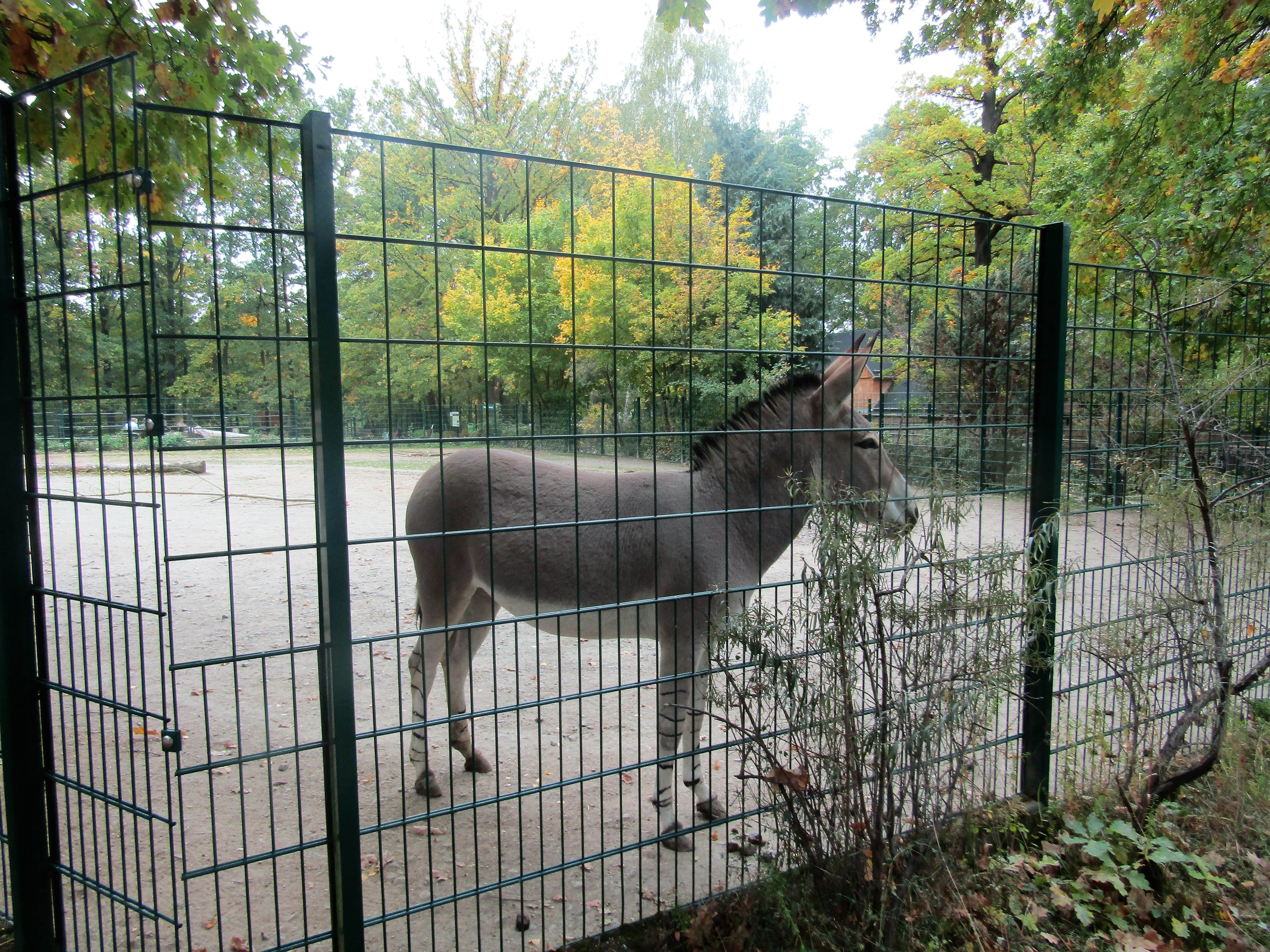 Somali-Wildesel (Equus africanus somaliensis) im Tierpark Chemnitz